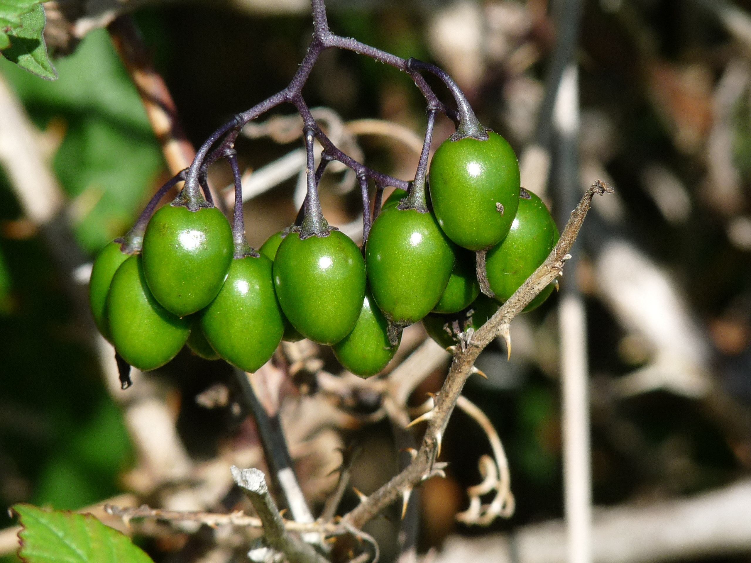 Pría - Bayas